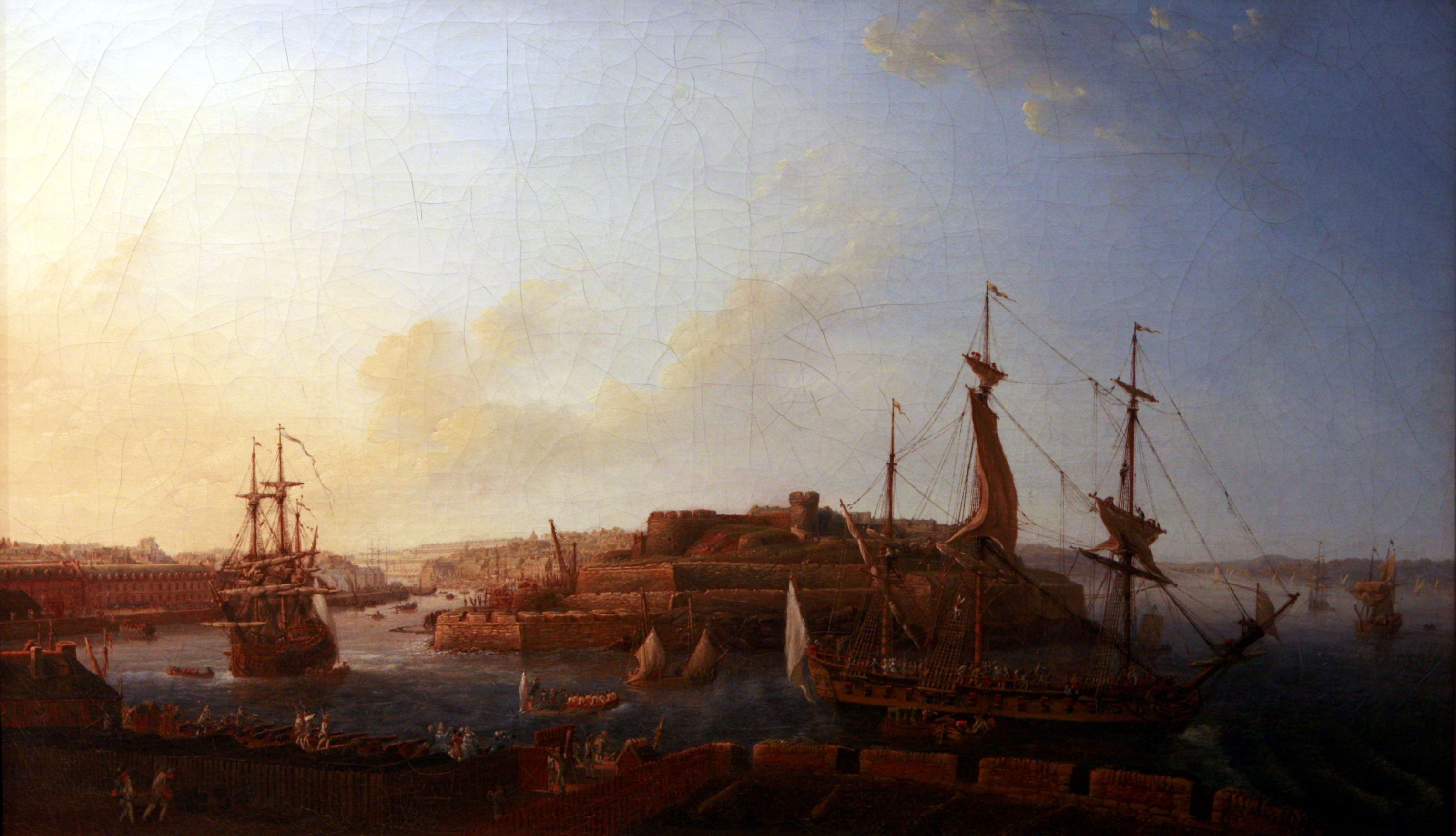 Vue de l'entrée du port prise de la batterie royalelabel QS:Lfr,"Vue de l'entrée du port prise de la batterie royale"